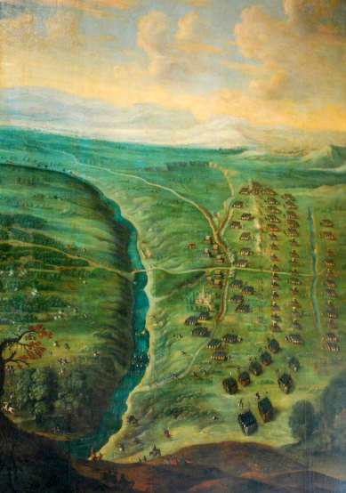 Bataille d'Avein, 20 mai 1635